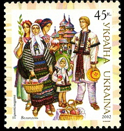 Марка з серії "Народний одяг України" 2001 Київщина Різдвяні свята